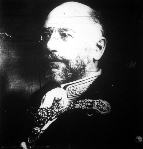 Weiss Manfréd nagyiparos.